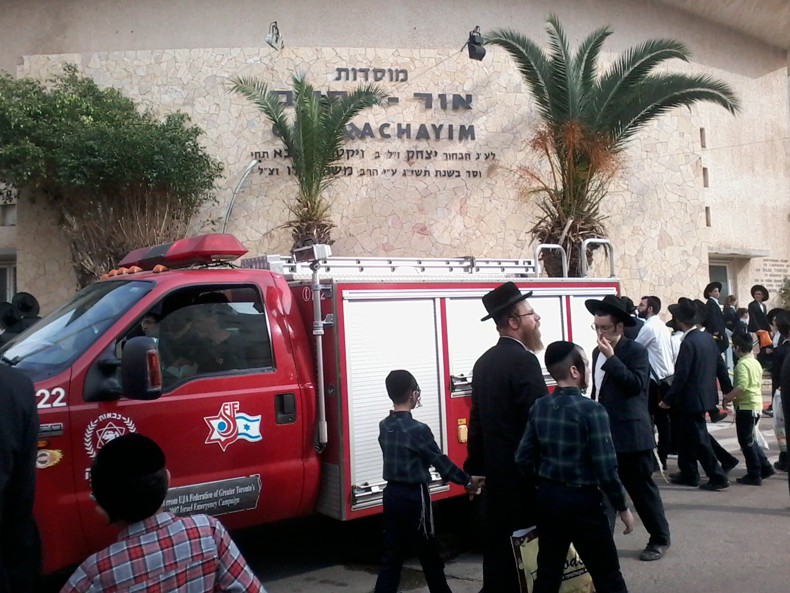 סמינר "אור החיים" - בניין נוסף